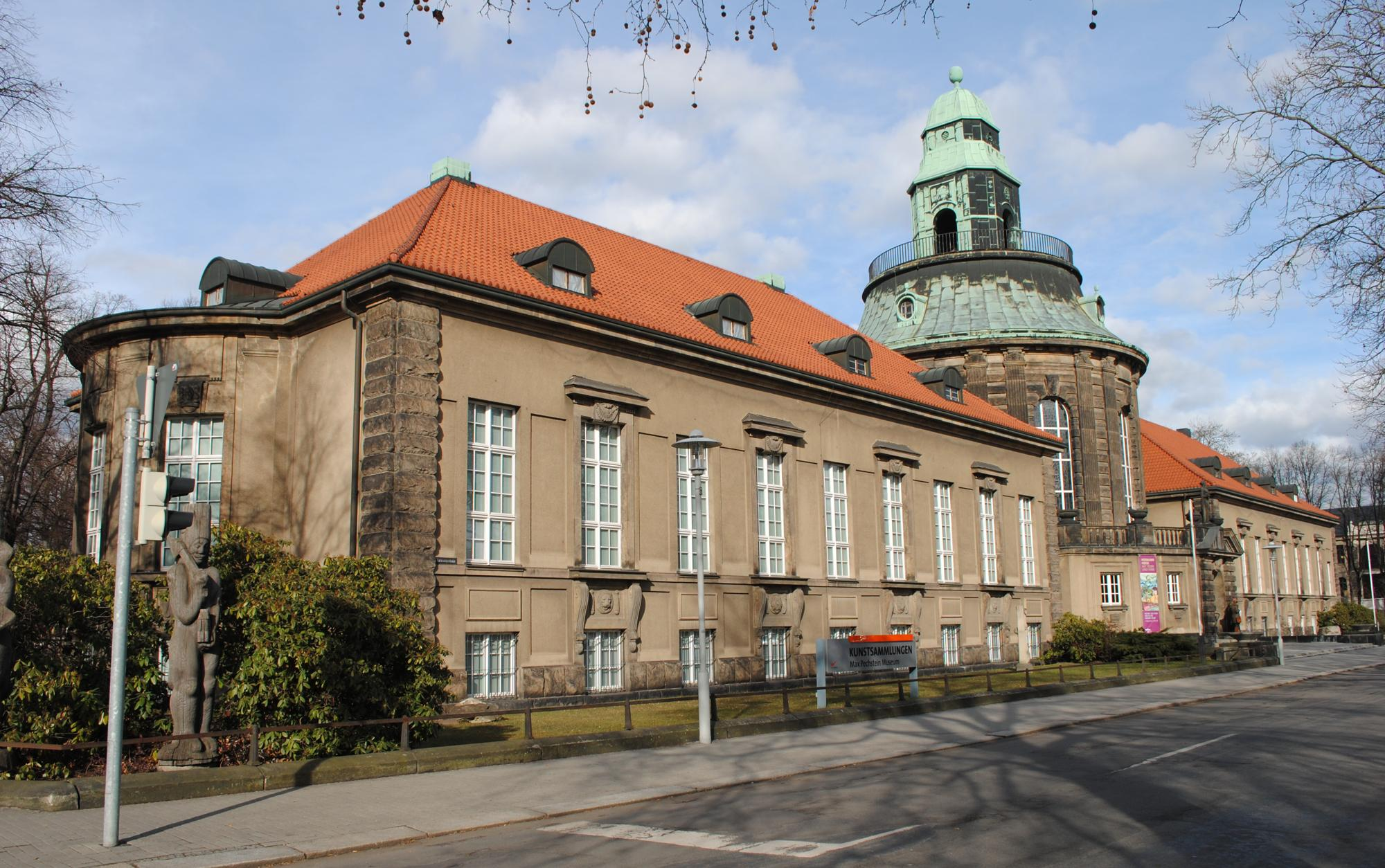 Kunstsammlungen in Zwickau, Lessingstr. 1